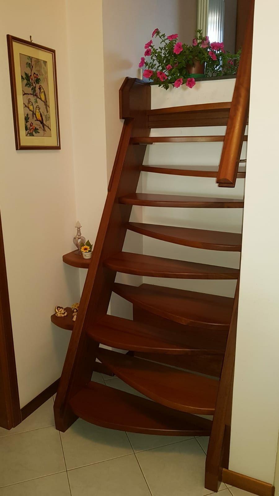 Con questa scala è stata trovata una soluzione ad un problema molto comune come una ripida tendenza, mantenendo intatto lo stile interno dell'arredamento